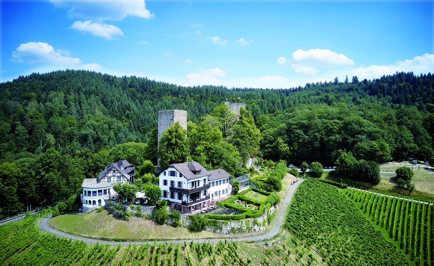 Burg Windeck